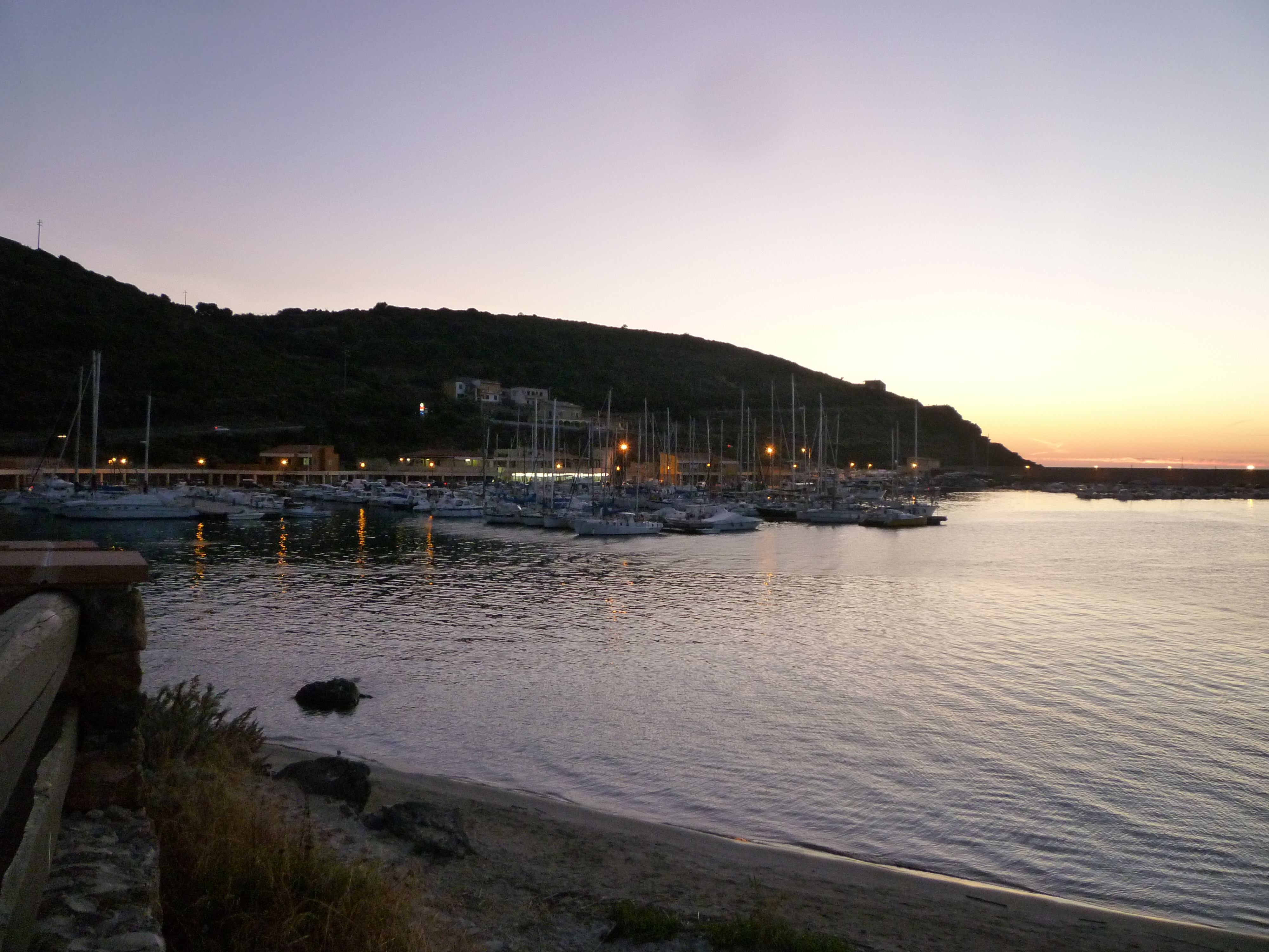 Il porto di Castelsardo, Sassari.